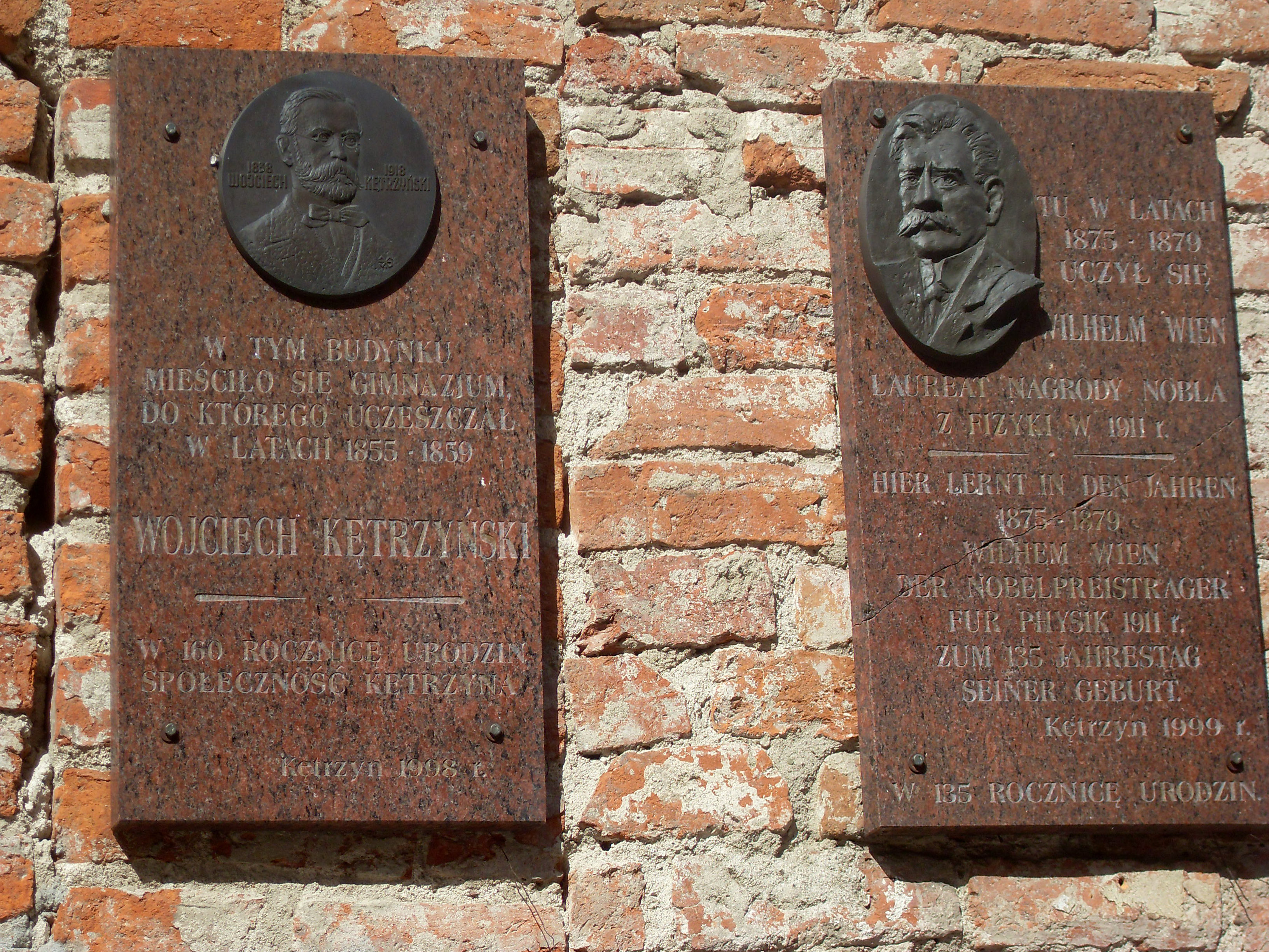 Tablice ku czci Wojciecha Kętrzyńskiego i Wilhelma Wiena na dawnej szkole w Kętrzynie.